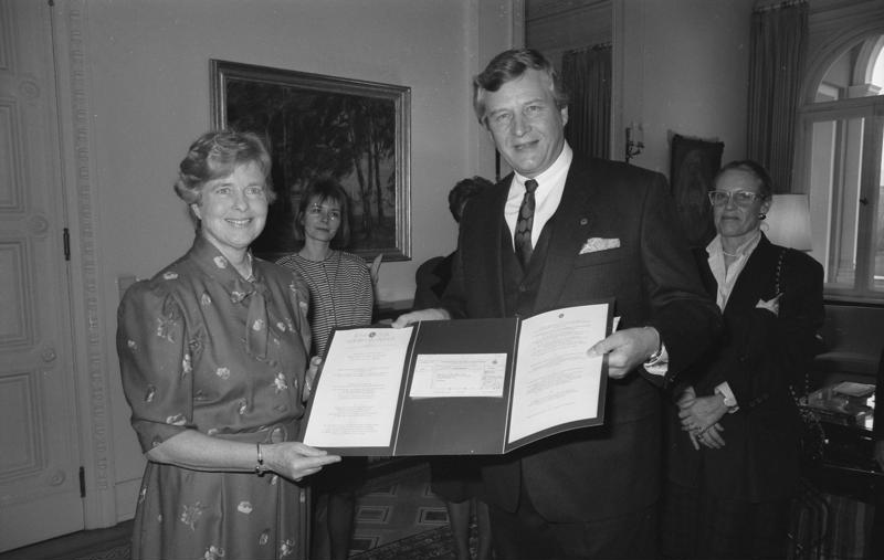 29.11.1990 Marianne von Weizsäcker empfängt Vertreter des Lions-Club Hofheim/Taunus, die ihr einen Scheck zugunsten der Stiftung Intergrationshilfe für ehemalige Drogenabhängige überreichen, im Bundespräsidialamt.